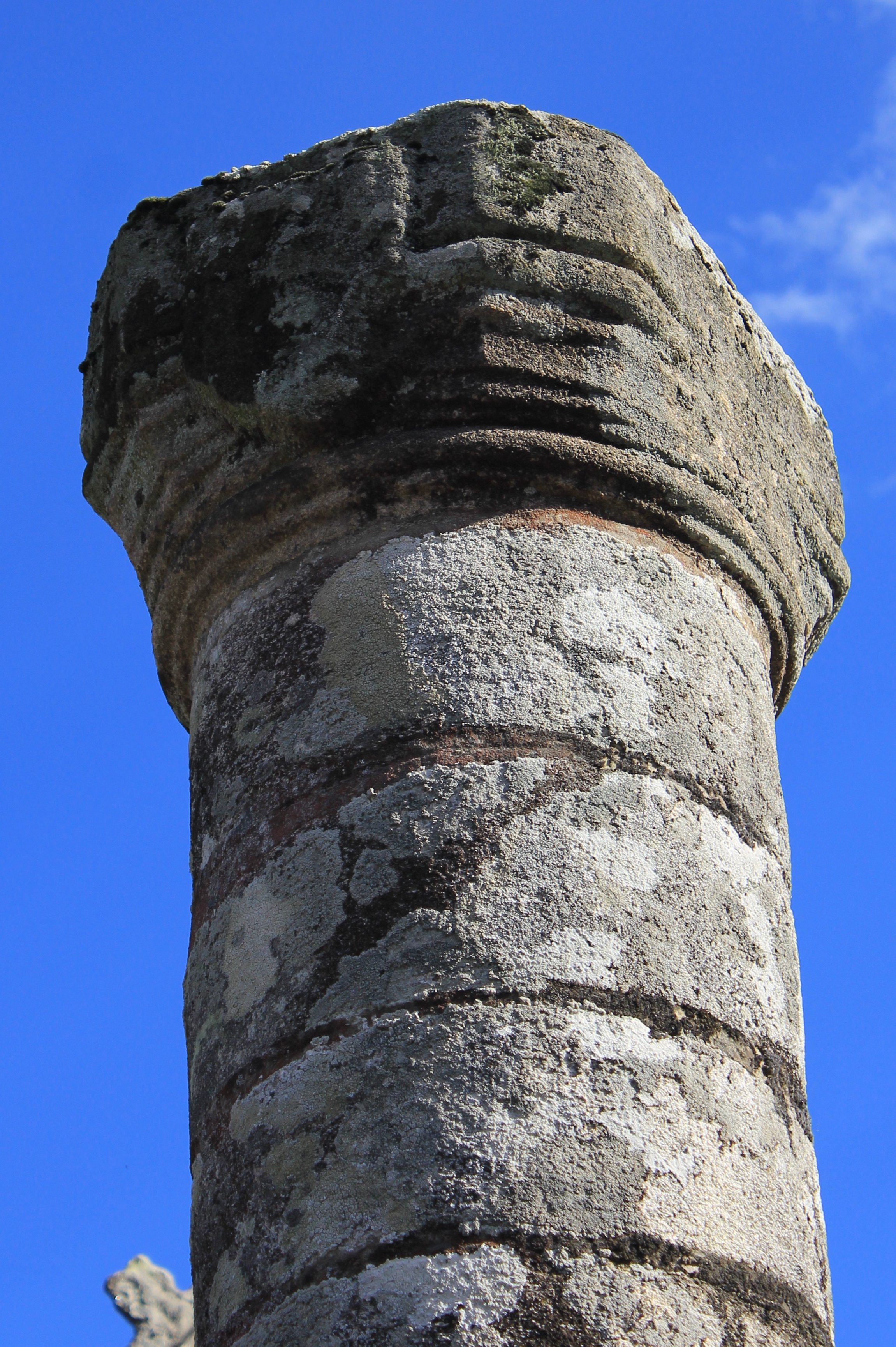 Colonne de justice (Trégranteur) : détail écusson aux armes des Trégranteur.